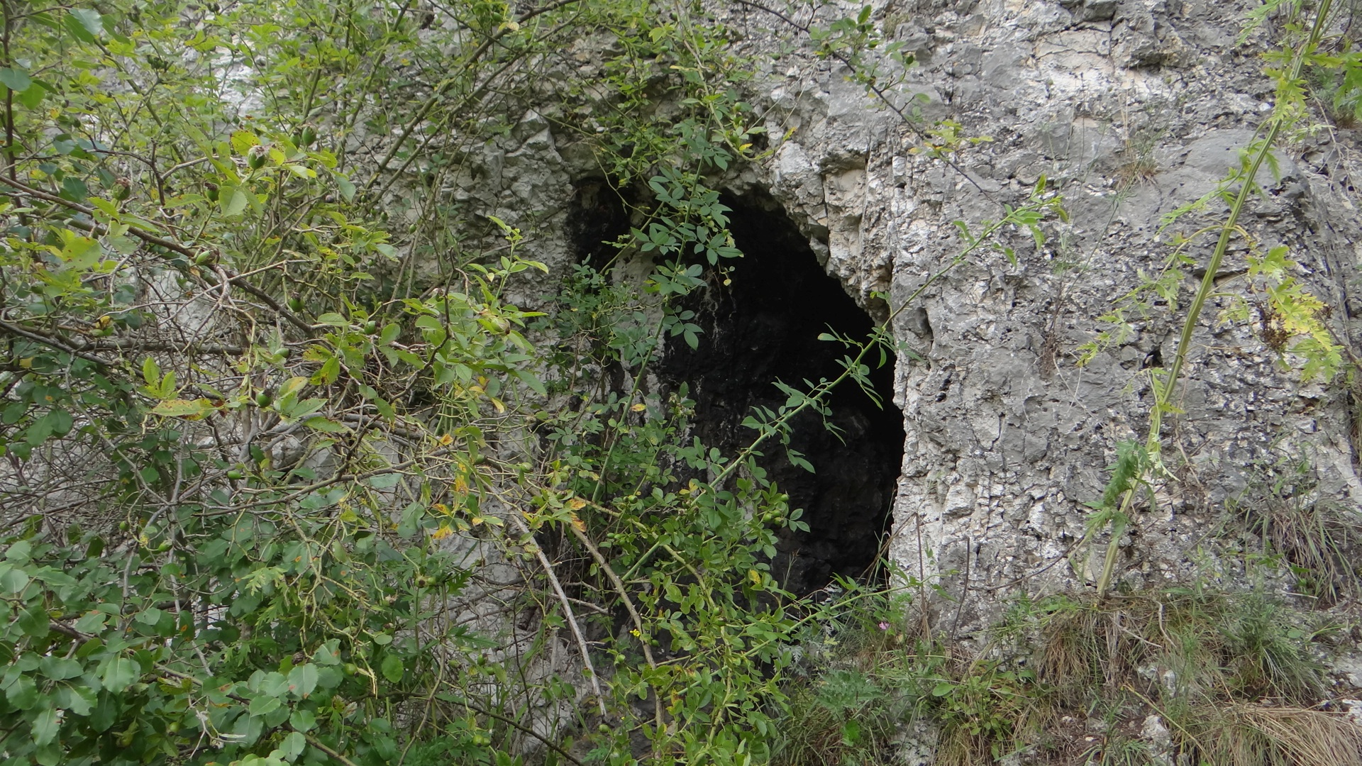 Schronisko Pierwsze w Wąwozie Ostryszni w Imbramowicach